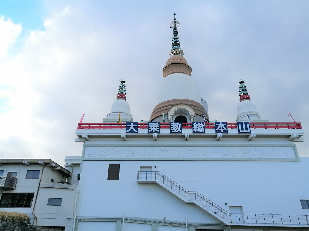 大乗教（名古屋発祥の新宗教）